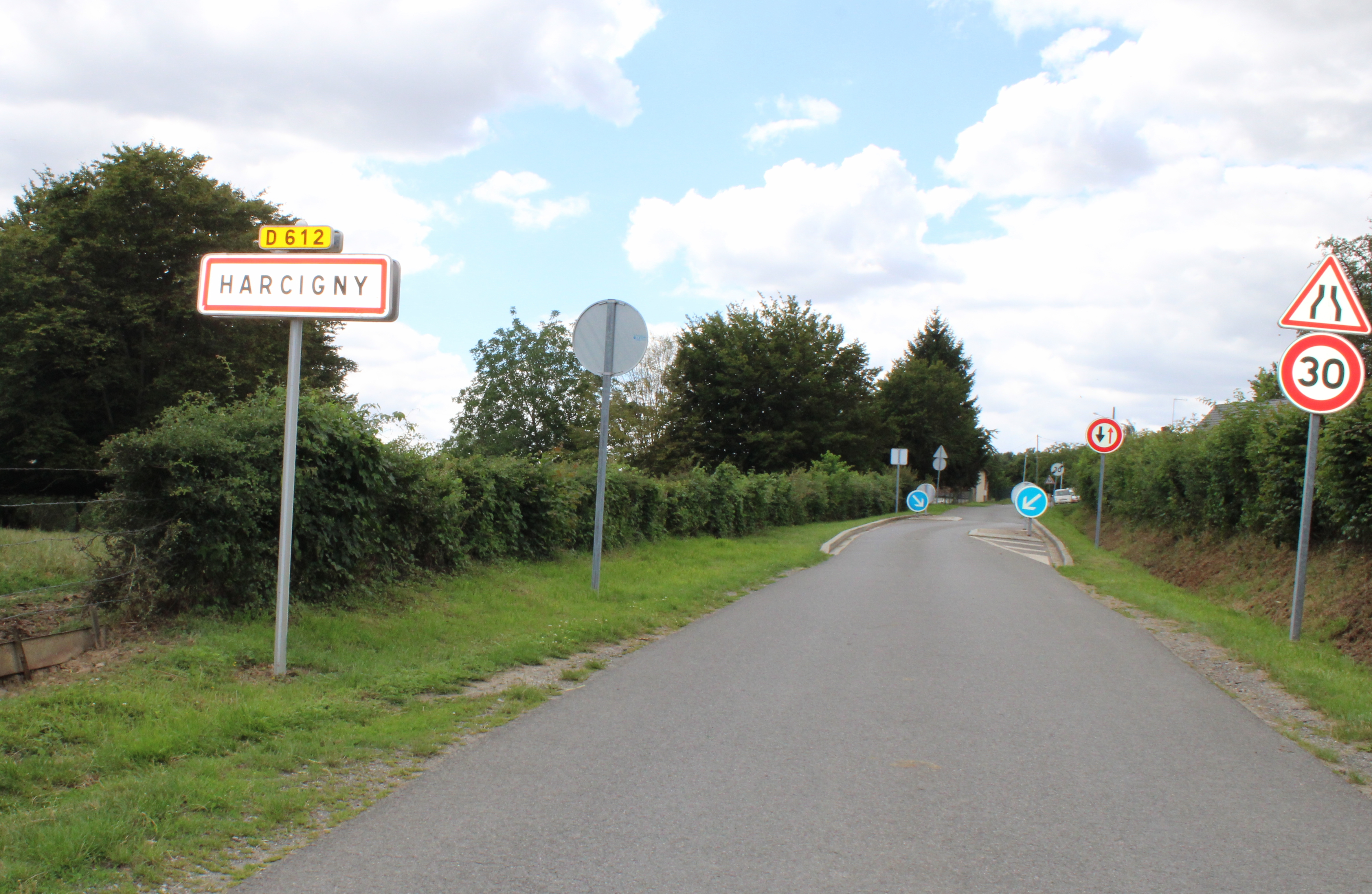 Entrée du village